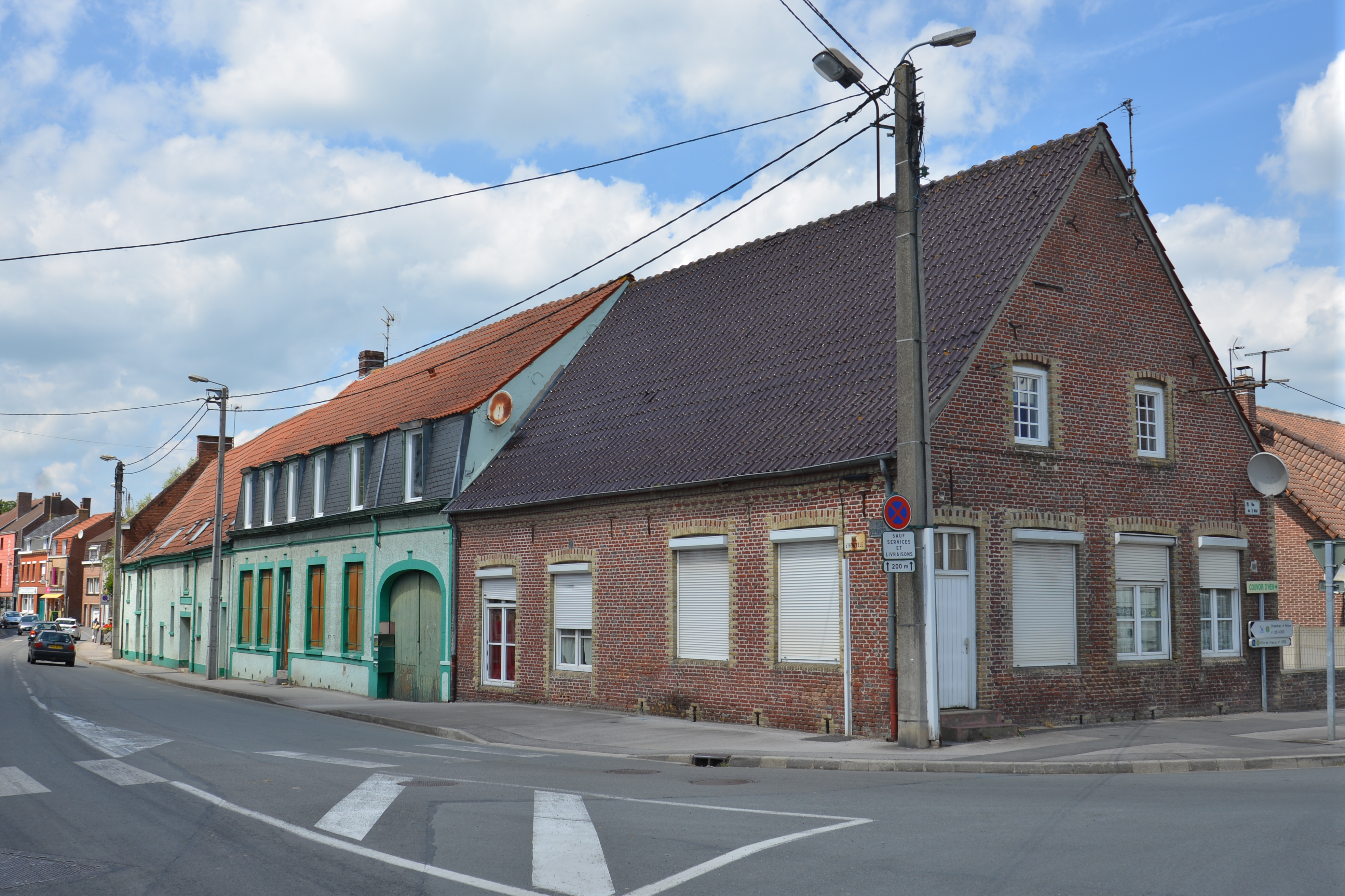 Maison